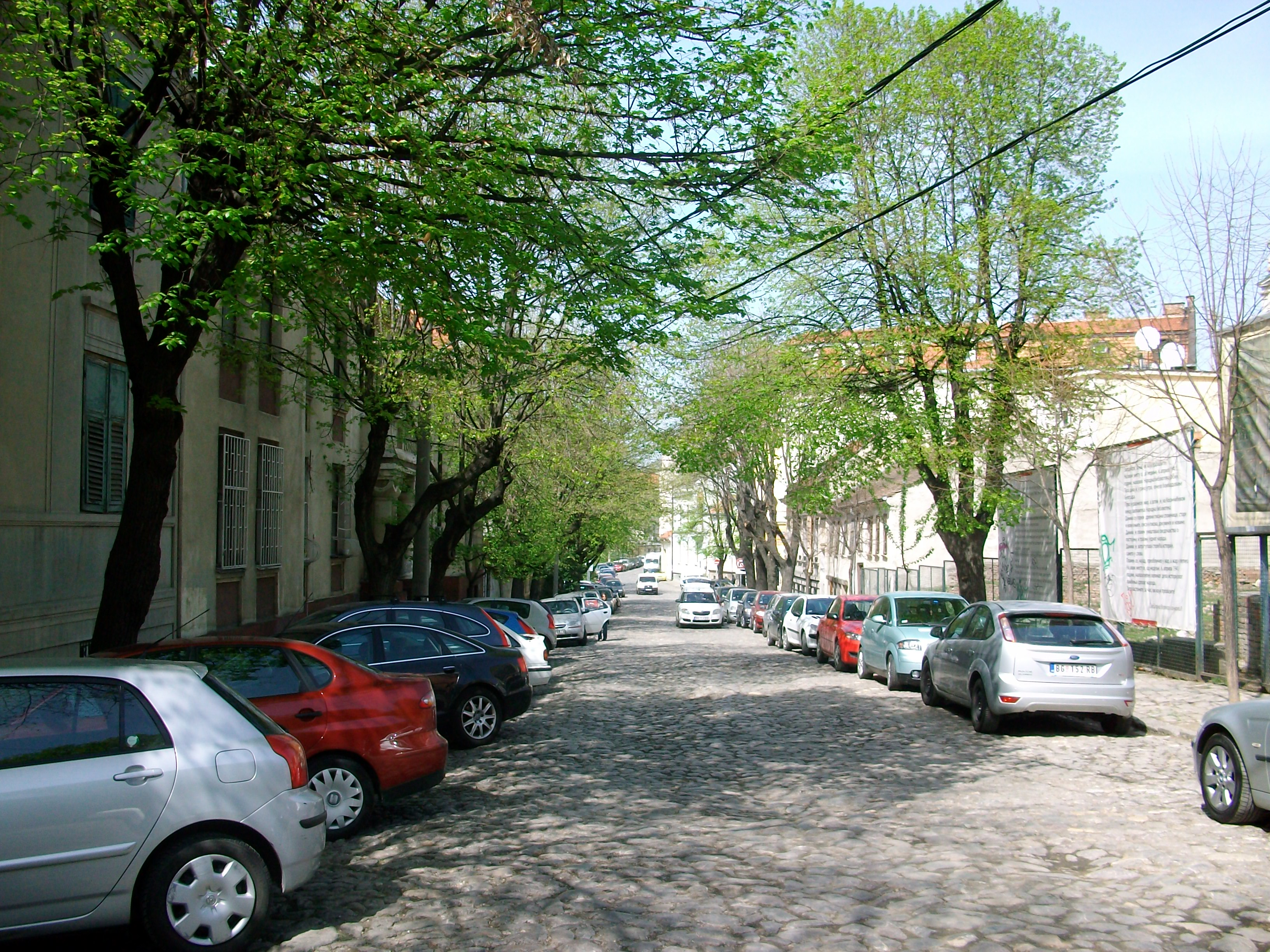 Косанчићев венац / Kosancicev venac